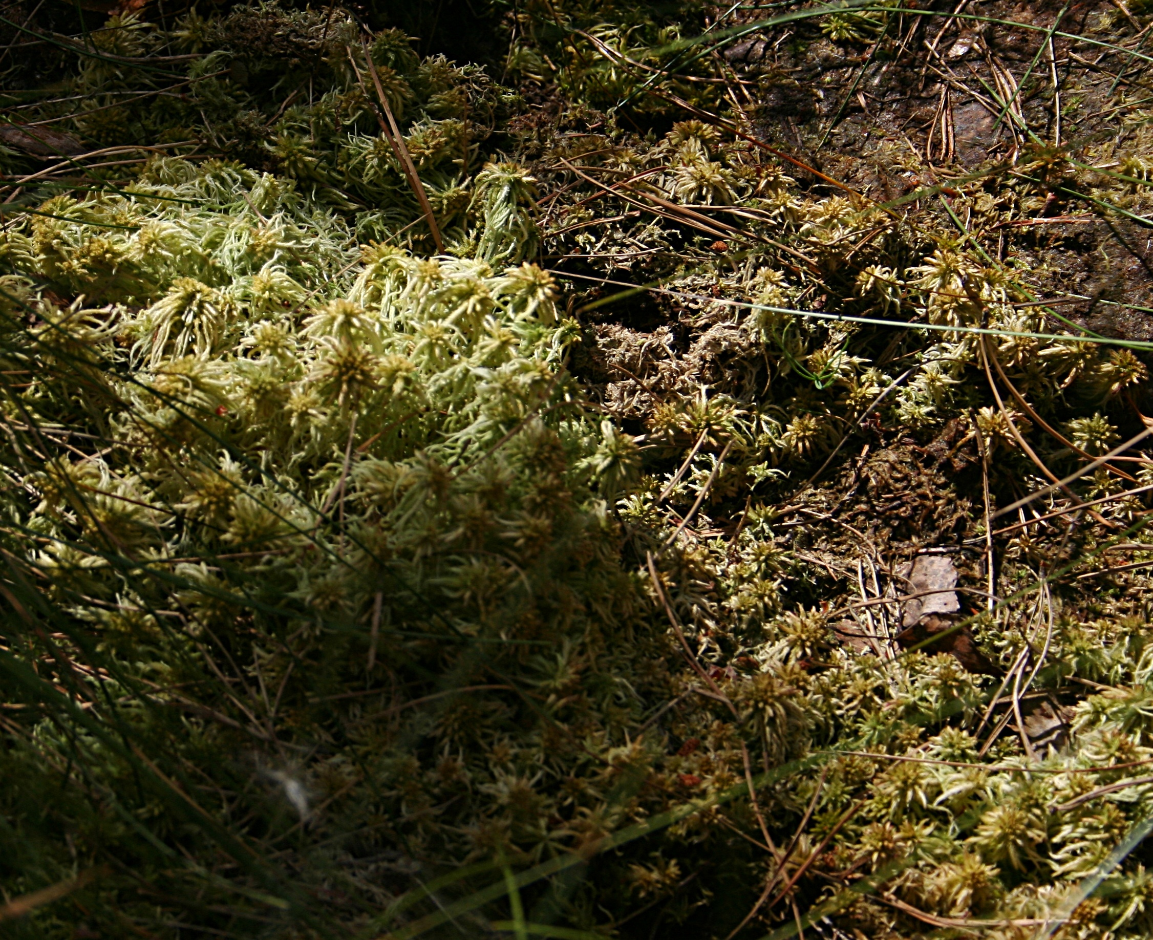 torfowiec (prawodopodbnie Sphagnum fuscum) w rezerwacie Dury, Wdecki Park Krajobrazowy